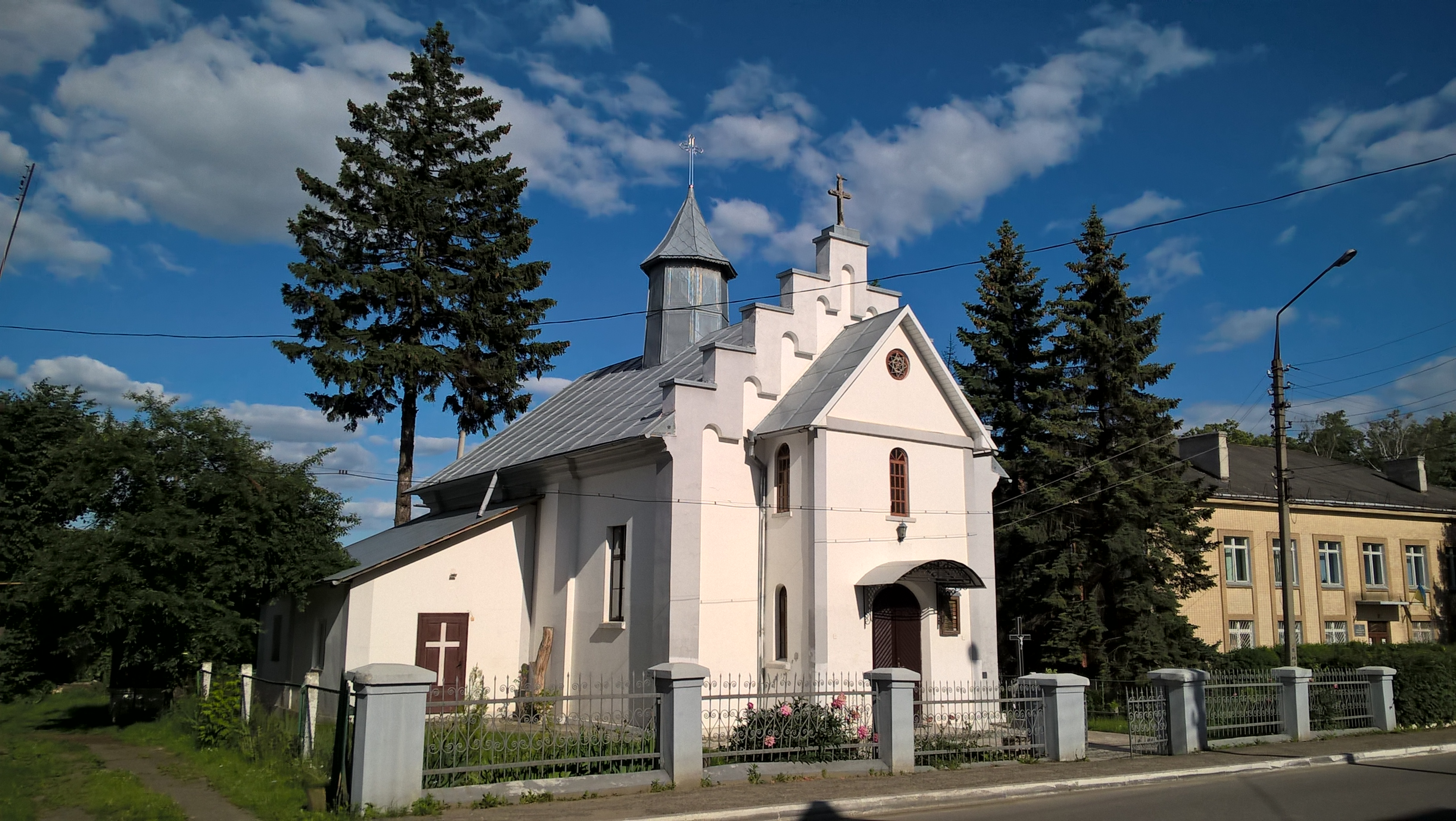 Римо-катольцький костел Матері Божої Страждальної